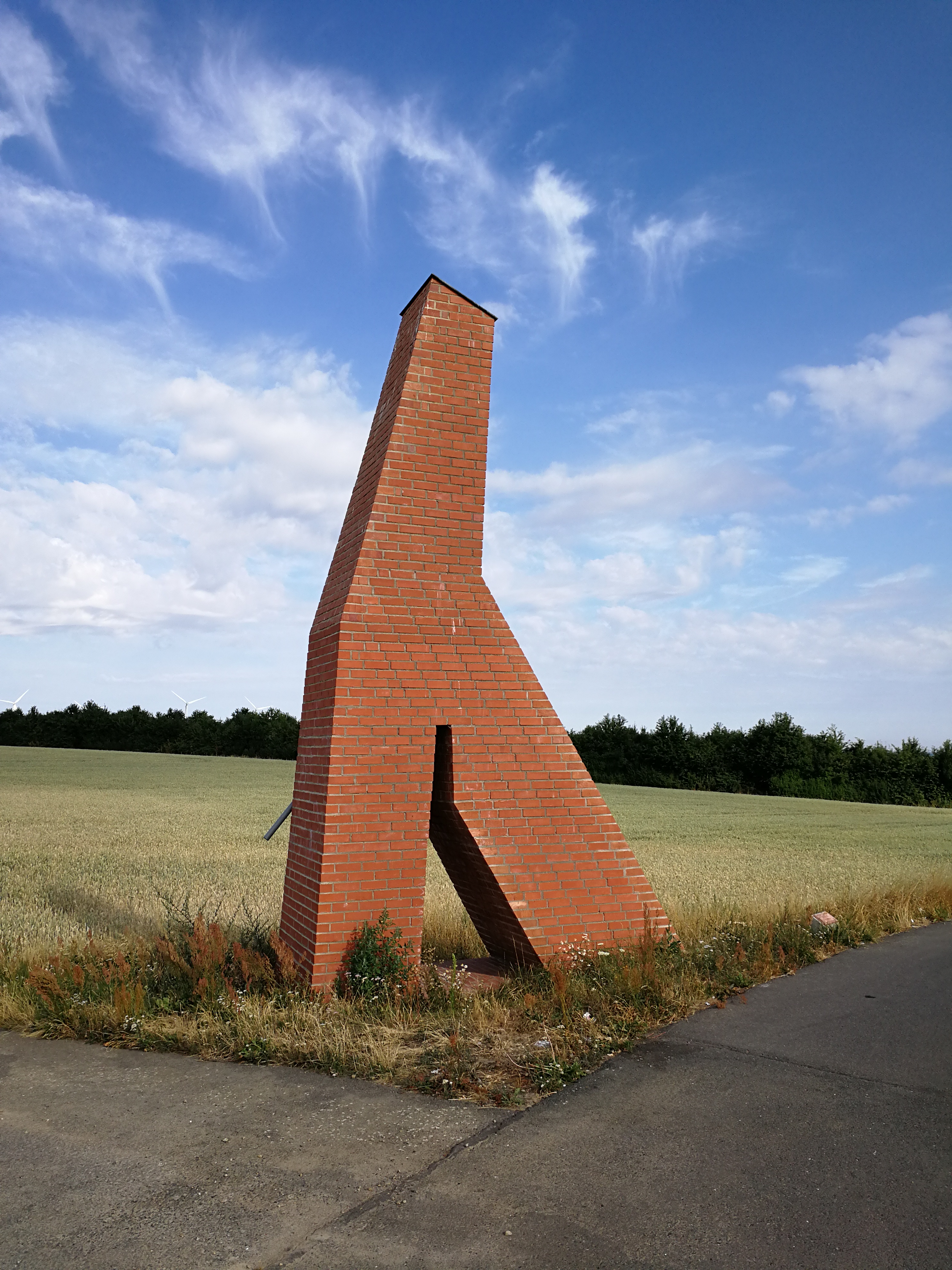 Schwerer Schritt; Skulptur von Frank Brinkmann; Via Regia Begegnungsort Mutzschen; Projekt Speicherbauten; europäisches Kunst- und Begegnungsprojekt Sculptura